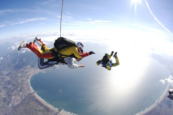 Panoramica de Salto en Tandem